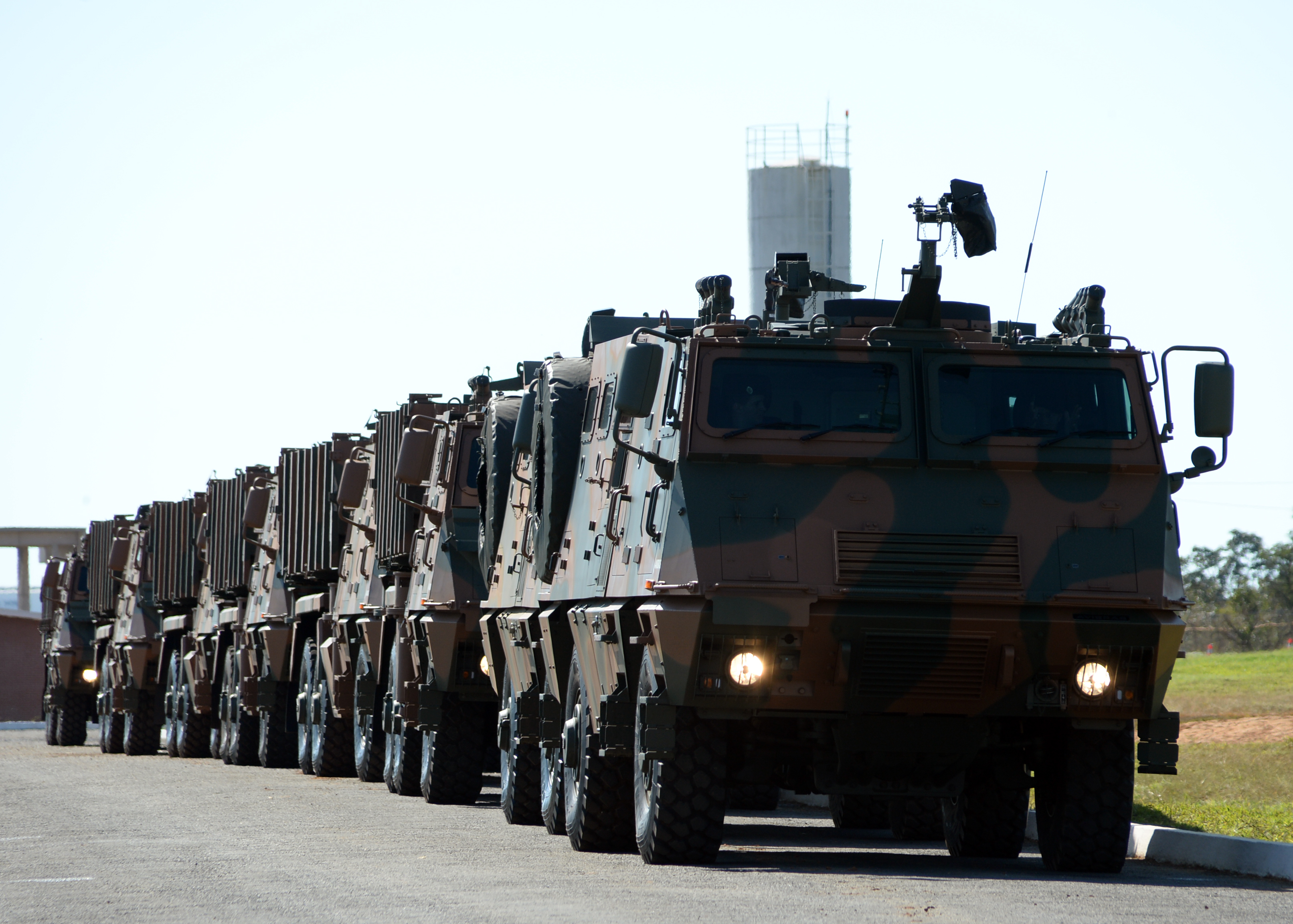 06/06/2014, Formosa - GO Fotos: Jorge Cardoso